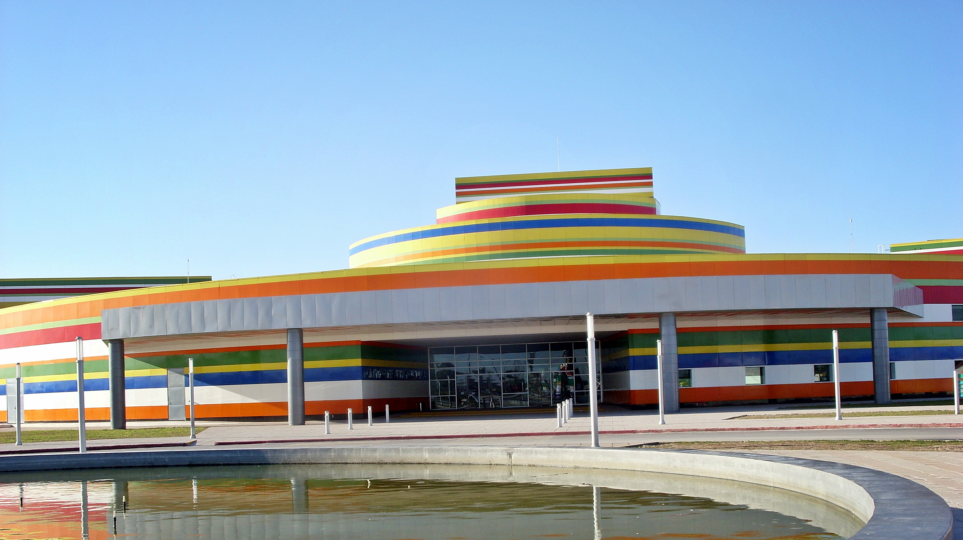 Recinto cultural en donde se llevan a cabo distintas actividades culturales y exposiciones de arte, así como presentaciones de danza. Ah sido sede en informes de gobierno, Globo Fest los cuales se llevan a cabo cada año. Este recinto cultural se ah convertido en un icono de la ciudad.